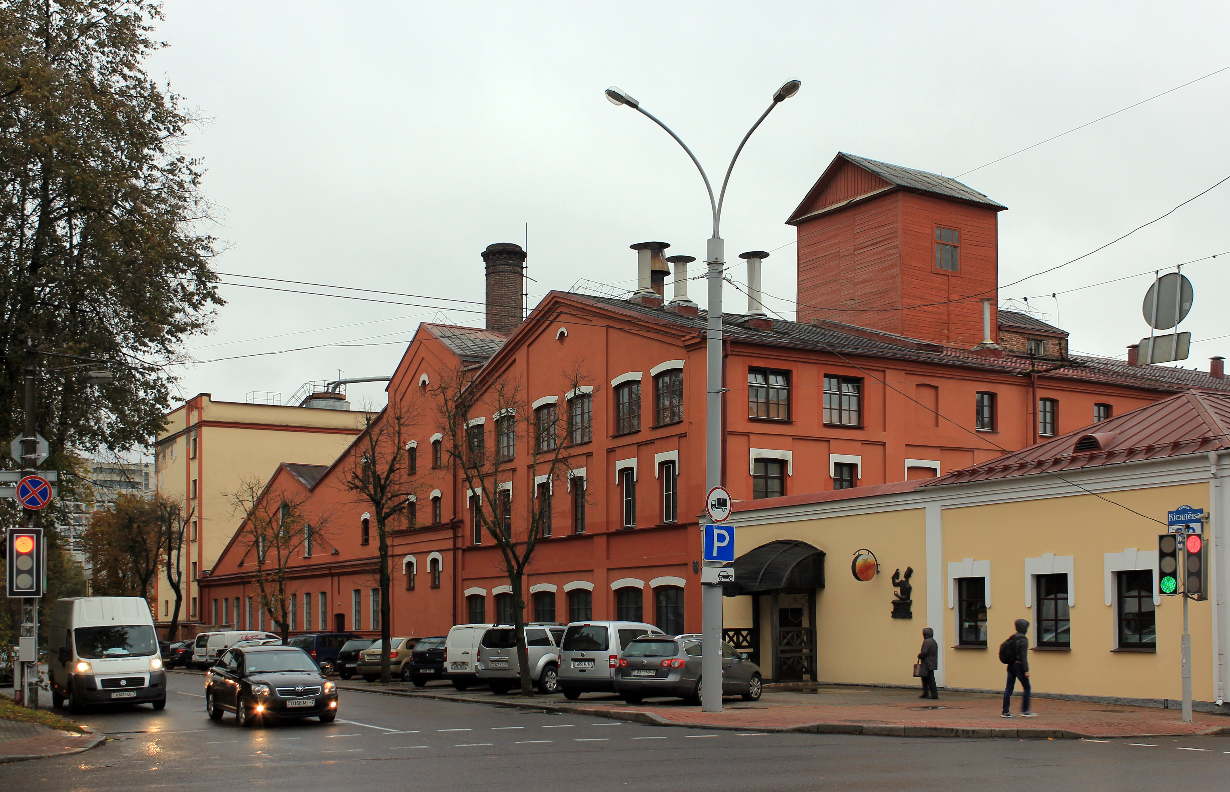 Комплекс зданий пивзавода «Оливария» в Минске. This is a photo of Belarusian heritage monument. Reference number: 712Г000083 ( WLM)